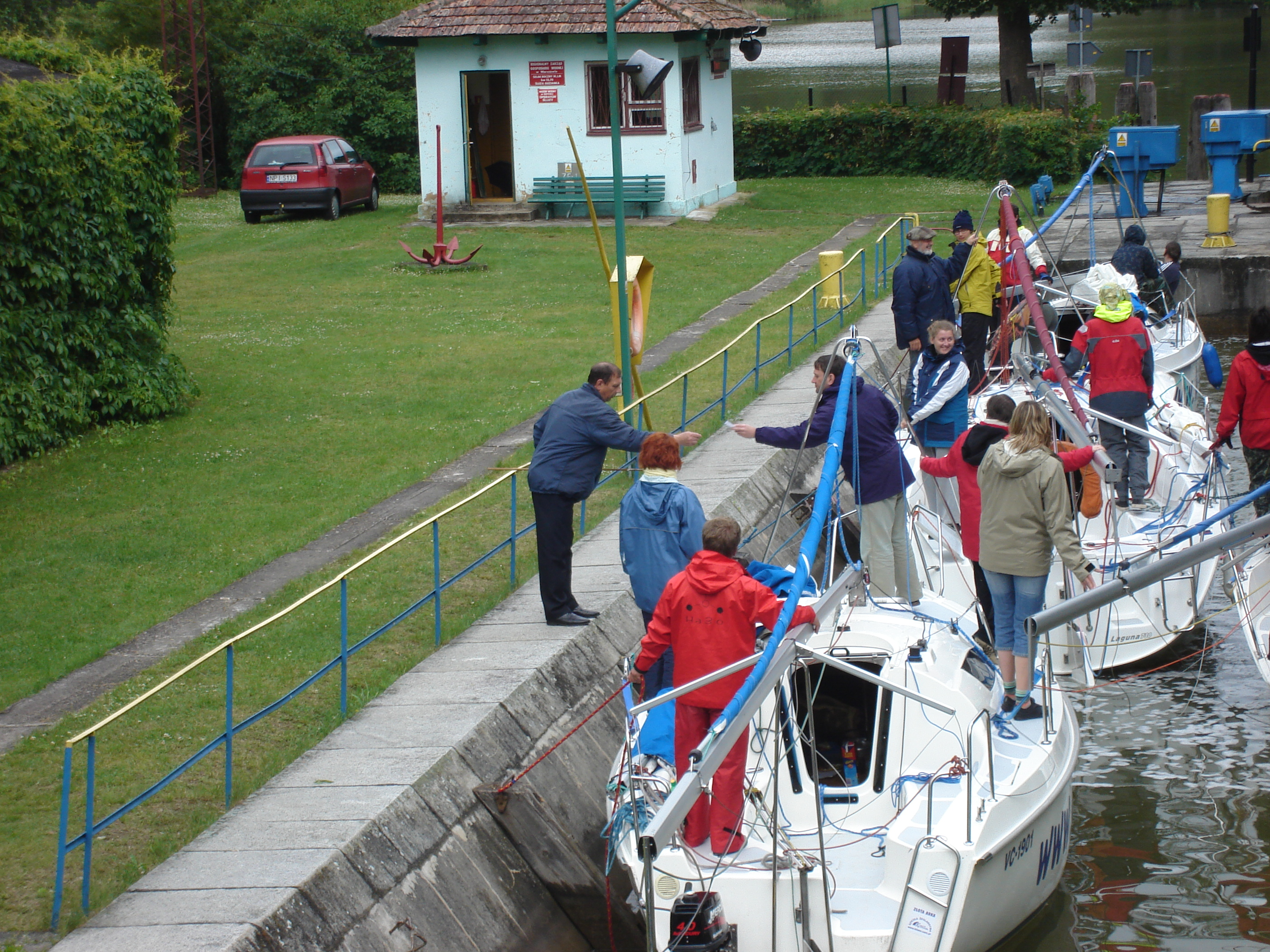 Śluza Guzianka. Pobieranie opłaty.